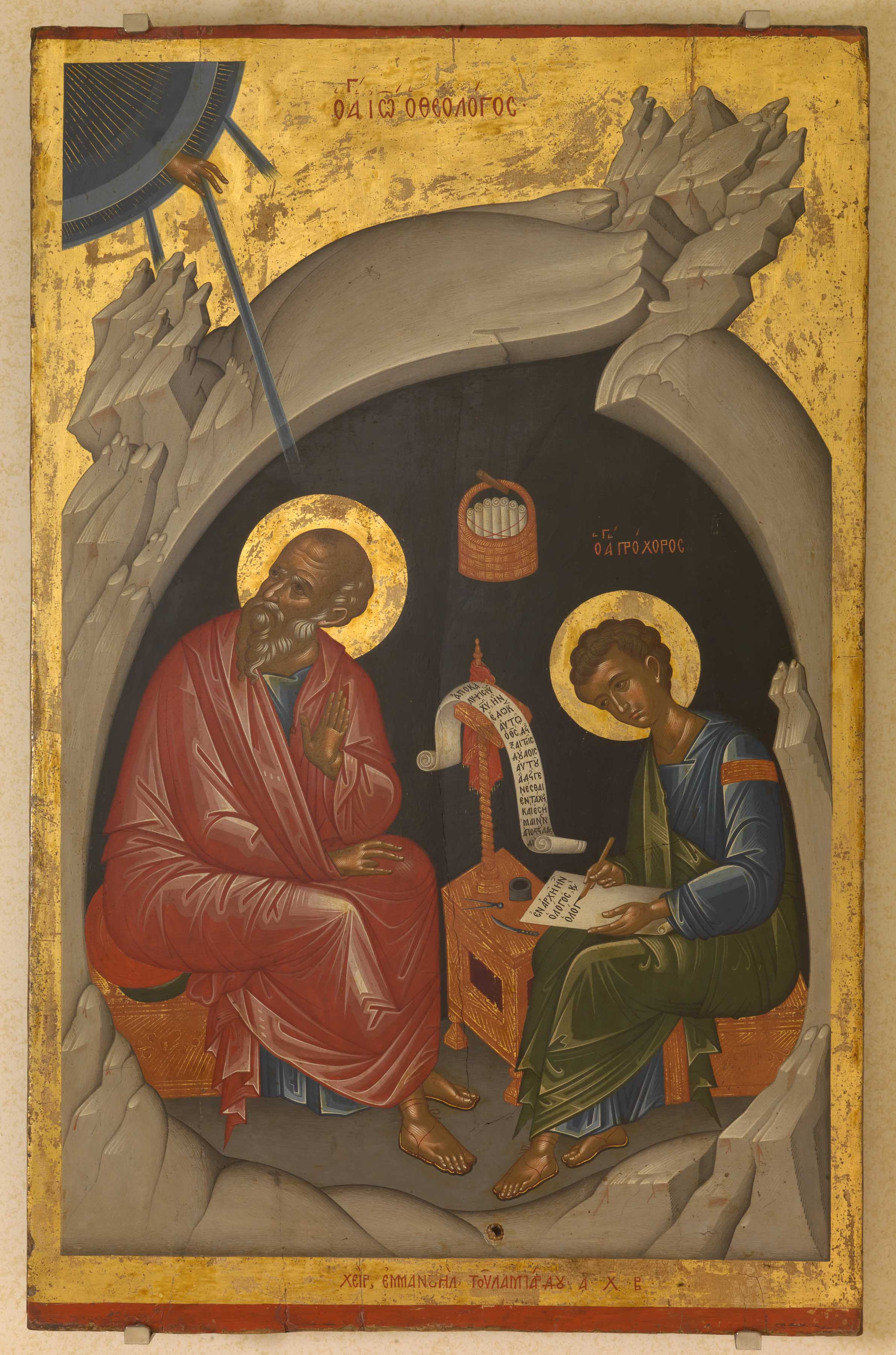 Ο Ευαγγελιστής Ιωάννης και ο Πρόχορος 1602, 65x113εκ. Εμμανουήλ Λαμπάρδος "Αρχή του κειμένου της Αποκάλυψης, αρχή του ευαγγελίου του Ιωάννη, ΟΑΓ(ιος) ΠΡΟΧΟΡΟC, ΧΕΙΡ ΕΜΜΑΝΟΥΗΛ ΤΟΥ ΛΑΜΠΑΡΔΟΥ ΑΧΒ΄" Στην εικόνα παριστάνεται το σπήλαιο της Πάτμου, μέσα στο οποίο βρίσκεται ο ευαγγελιστής Ιωάννης που υπαγορεύει στο μαθητή του Πρόχορο. Ο Ιωάννης στρέφει το κεφάλι του προς τον ουρανό, από τον οποίο προβάλλει το χέρι του Θεού που ευλογεί και ακτίνες, από τις οποίες η μία κατευθύνεται προς τον ευαγγελιστή. Ο Πρόχορος καθισμένος απέναντί του γράφει σε ανοιχτό ειλητό την αρχή του ευαγγελίου του Ιωάννη: ΕΝ ΑΡΧΗ ΗΝ Ο ΛΟΓΟC ΚΑΙ Ο ΛΟΓ[OC] (Ιωάν. 1.1). Ανάμεσα στις δύο μορφές υπάρχει χαμηλό γραφείο και αναλόγιο, επάνω στο οποίο βρίσκεται ειλητό, όπου αναγράφεται η αρχή της Αποκάλυψης. Επάνω στο γραφείο βρίσκονται τα όργανα για τη γραφή, και στο βάθος του σπηλαίου, κρέμεται από καρφί καλαθάκι με τυλιγμένα χειρόγραφα.